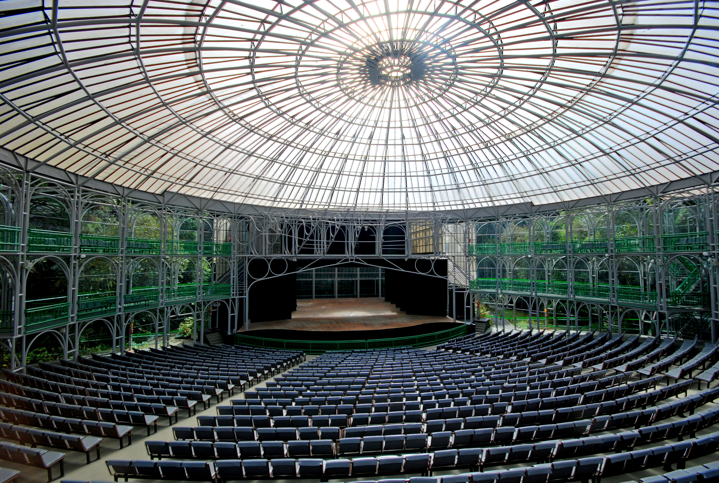 Interior da Ópera de Arama, Curitiba, Paraná, Brasil.